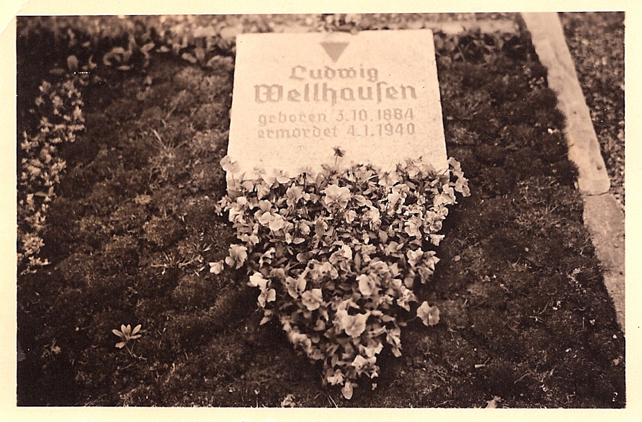 Gedenkstein Ludwig Wellhausen, Westfriedhof, Magdeburg